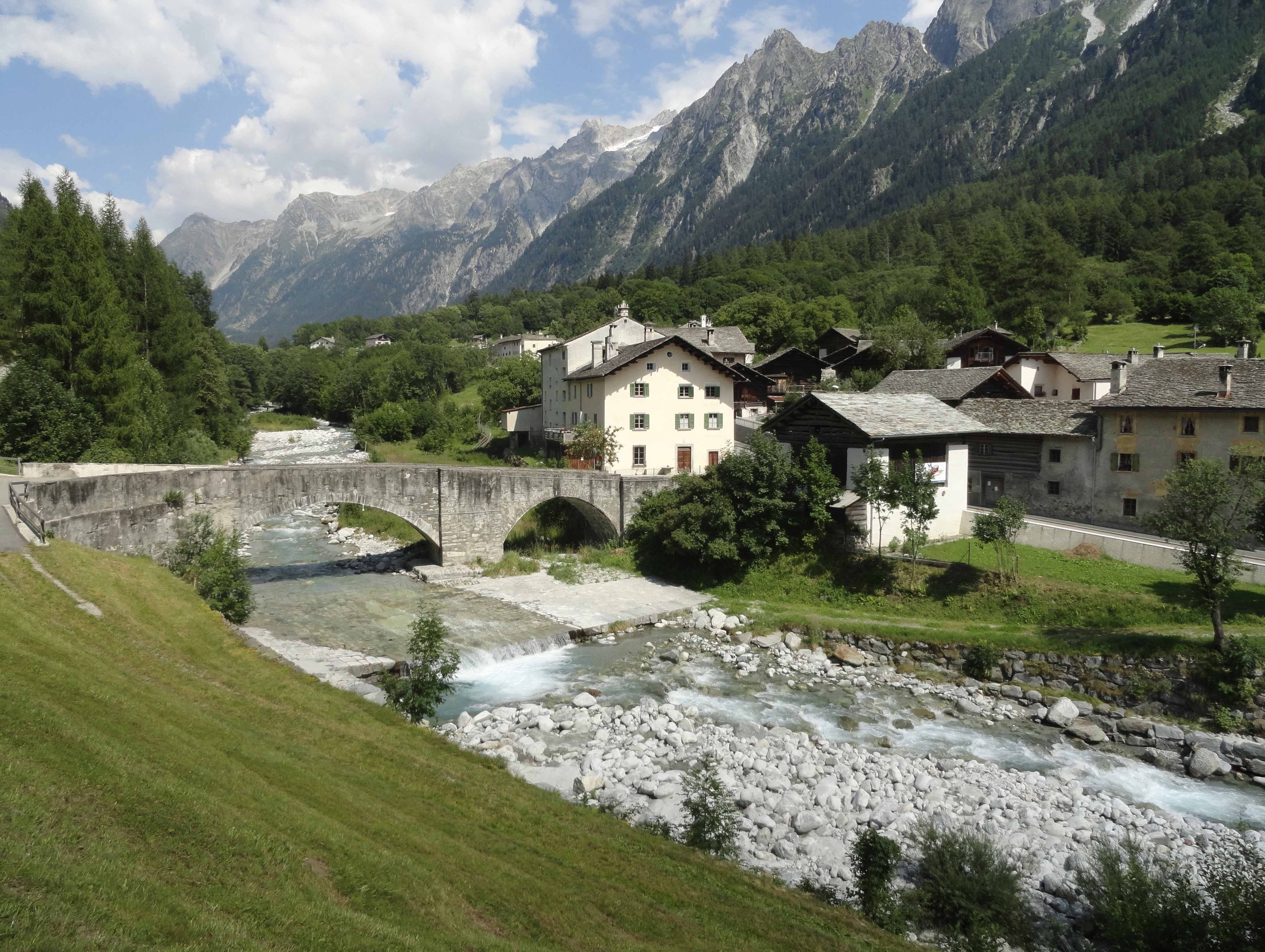 Bahnmuseum